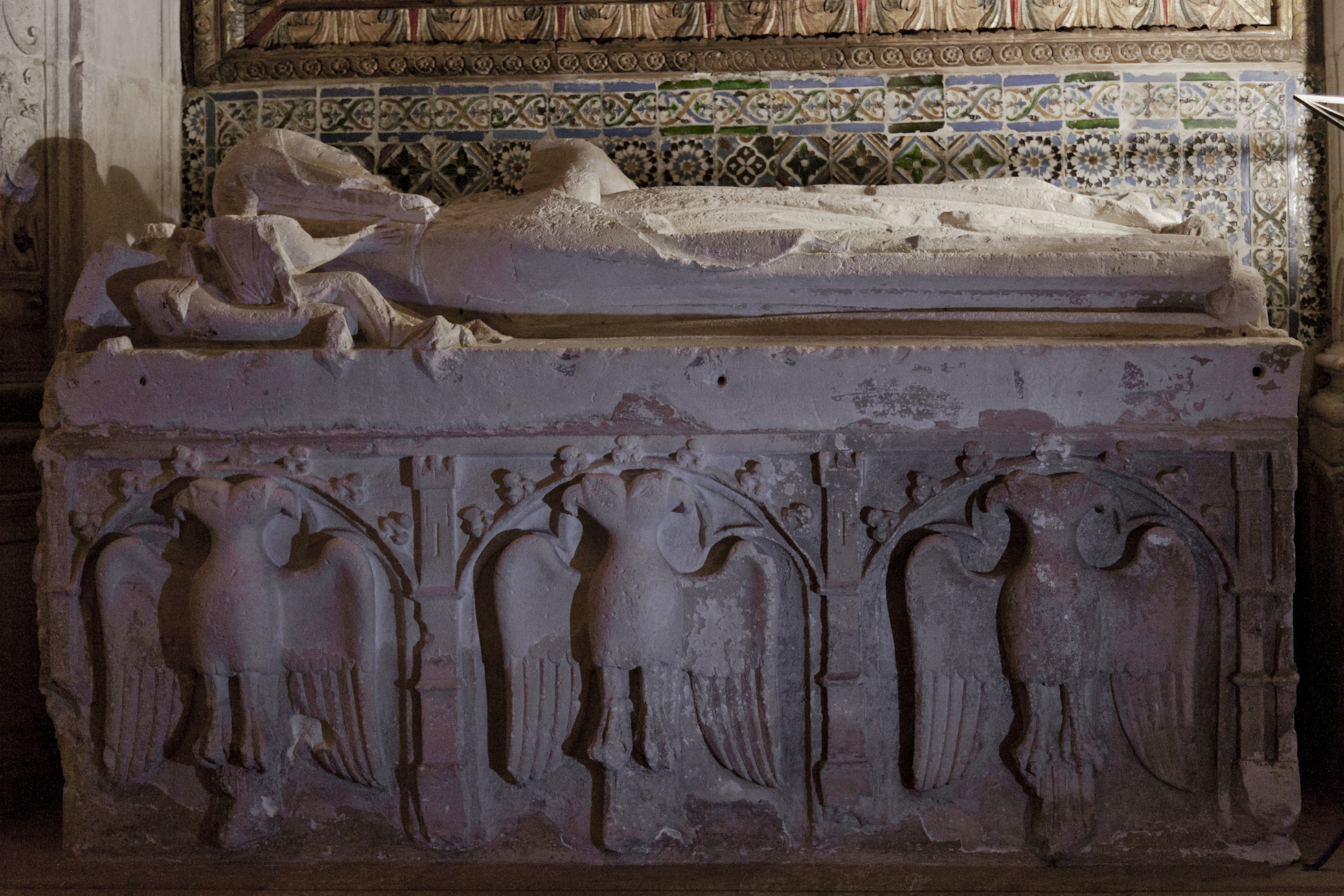 Mestre Pero, Túmulo de Vataça Lascaris, Sé Velha de Coimbra